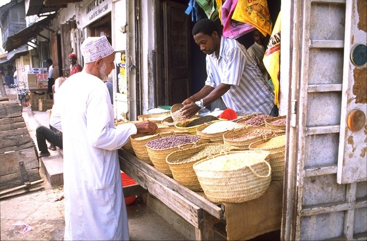 Shop in Zanzibar